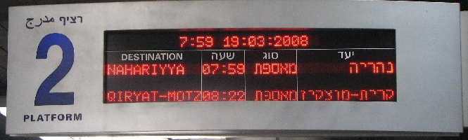 שלט מידע דינמי בתחנת רכבת